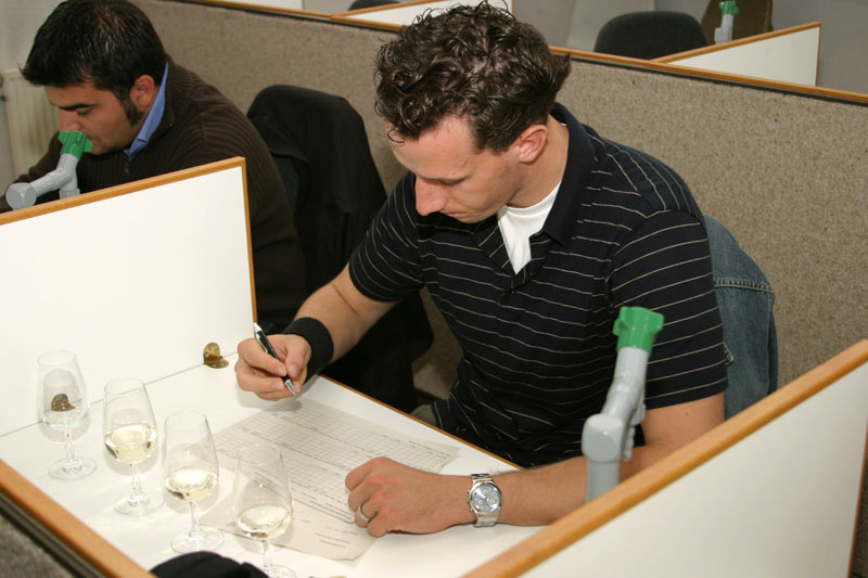 Weinbaustudenten bei einem Weinbeurteilungsseminar, fotografiert 2004